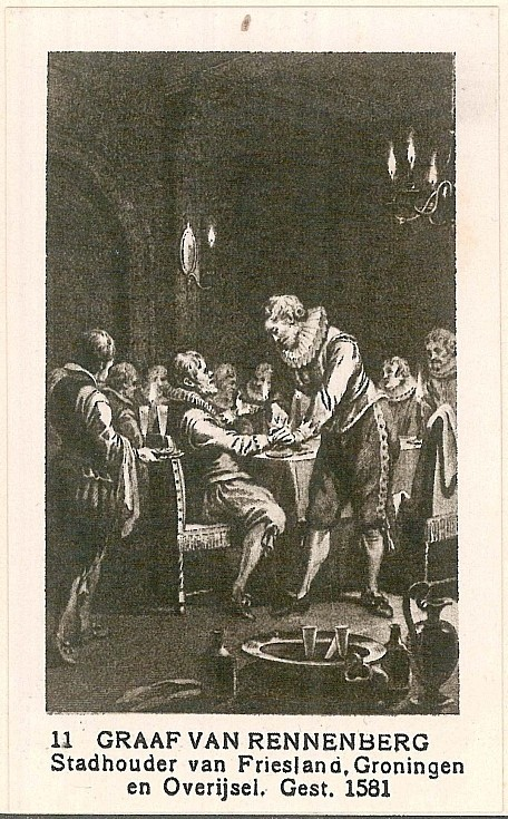 Stadhouder van Friesland, Groningen en Overijsel. Gestorven 1581